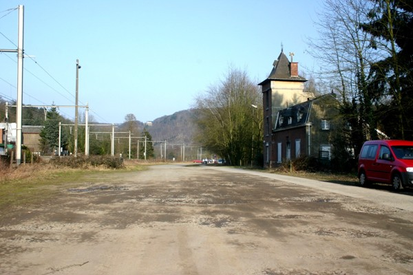 Den zougetippten Kanal, riets d'Haus vum Schleisewiechter.